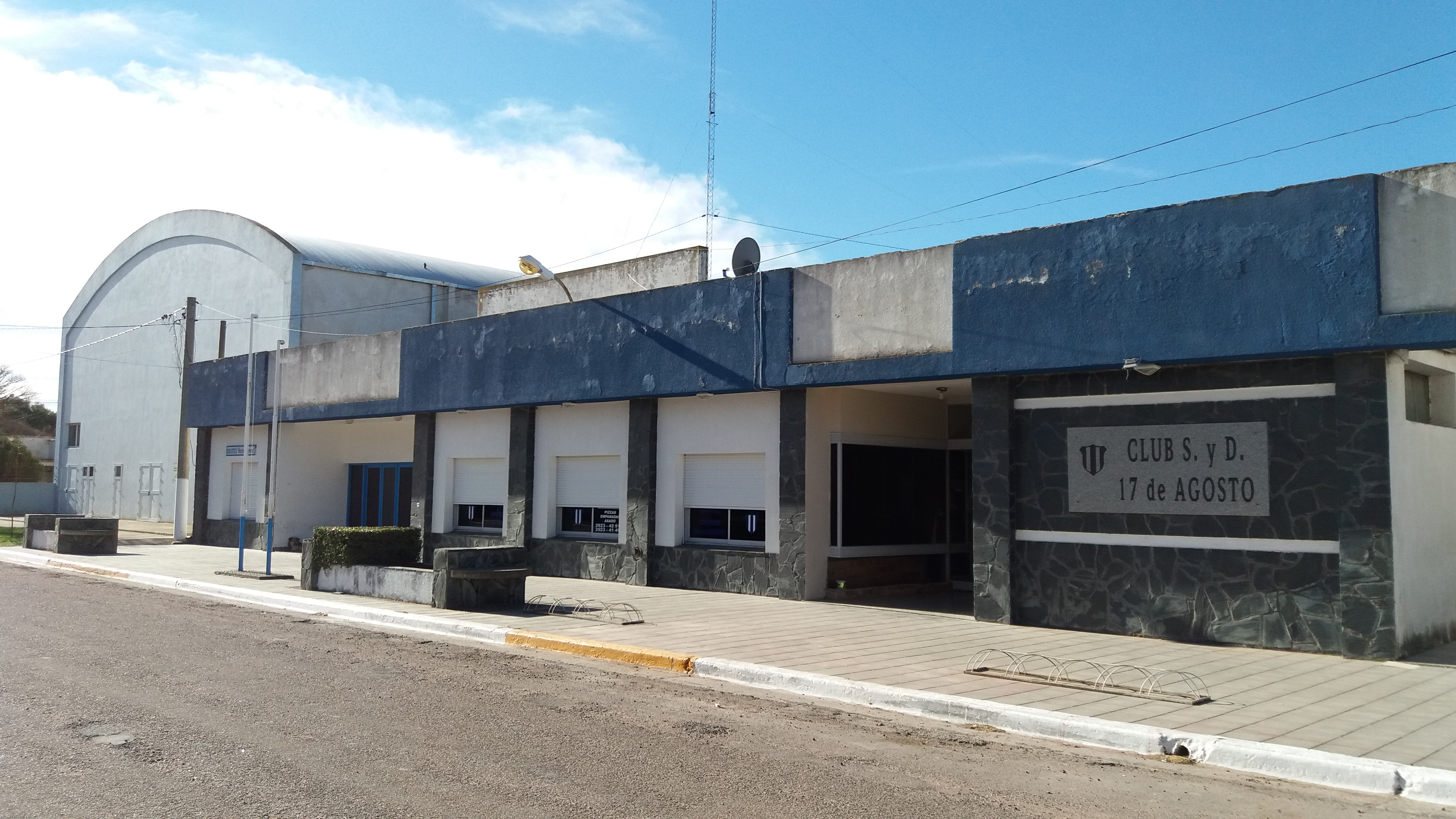 Club Social y Deportivo 17 de Agosto (Diecisiete de Agosto, Partido de Puan, Provincia de Buenos Aires)